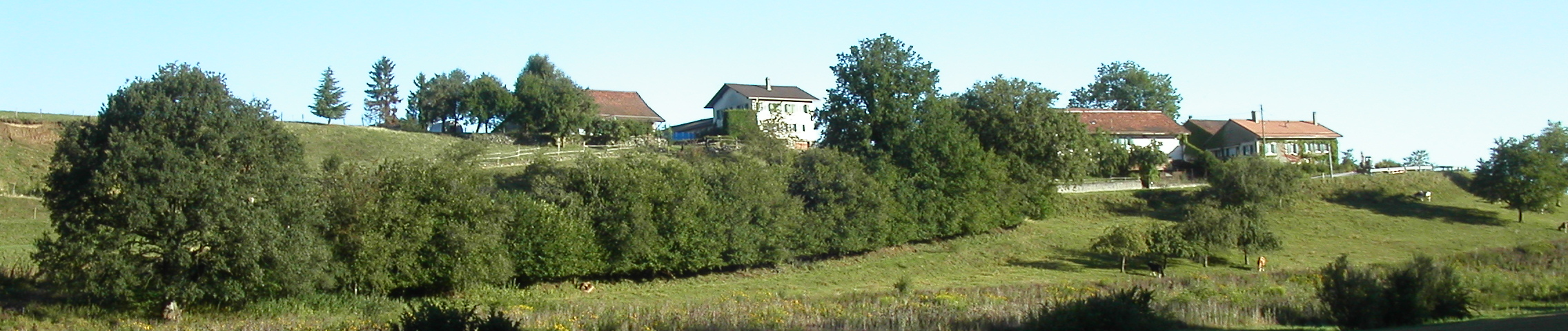 Froideville, village de la commune de Ballens, canton de Vaud, Suisse. Auteur : Marc Mongenet Date : 18 août 2006